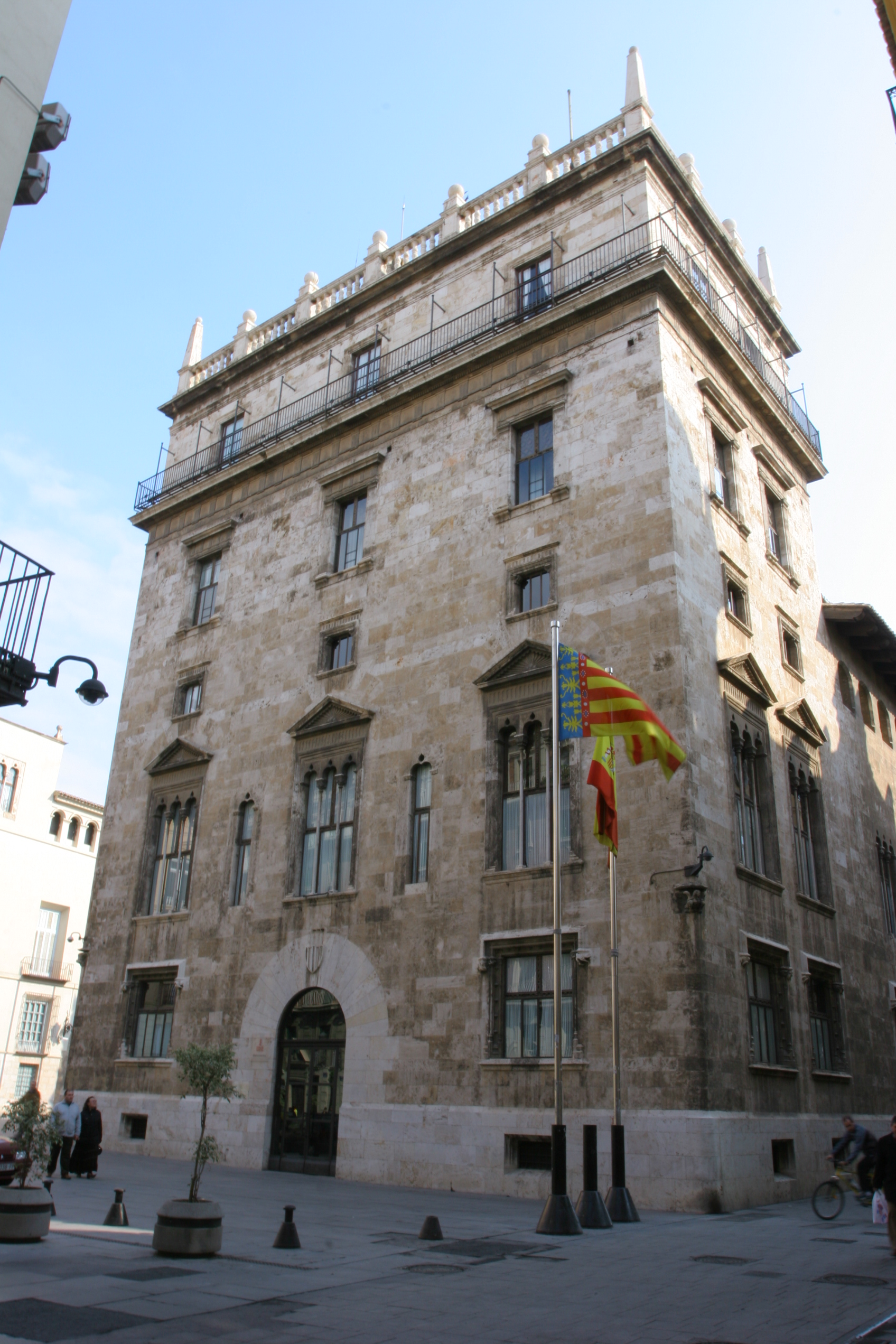 Entrada principal a la Presidència de la Generalitat. Vista des del creuament del carrer de Cavallers amb el carrer de Juristes.